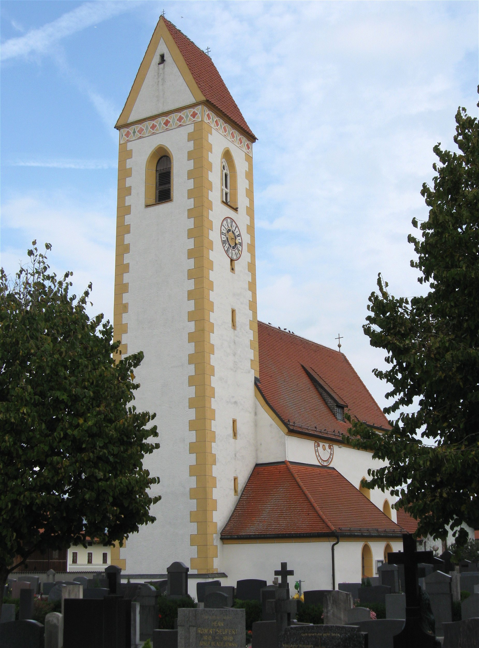 Kirche in Högling, Bruckmühl This is a photograph of an architectural monument.